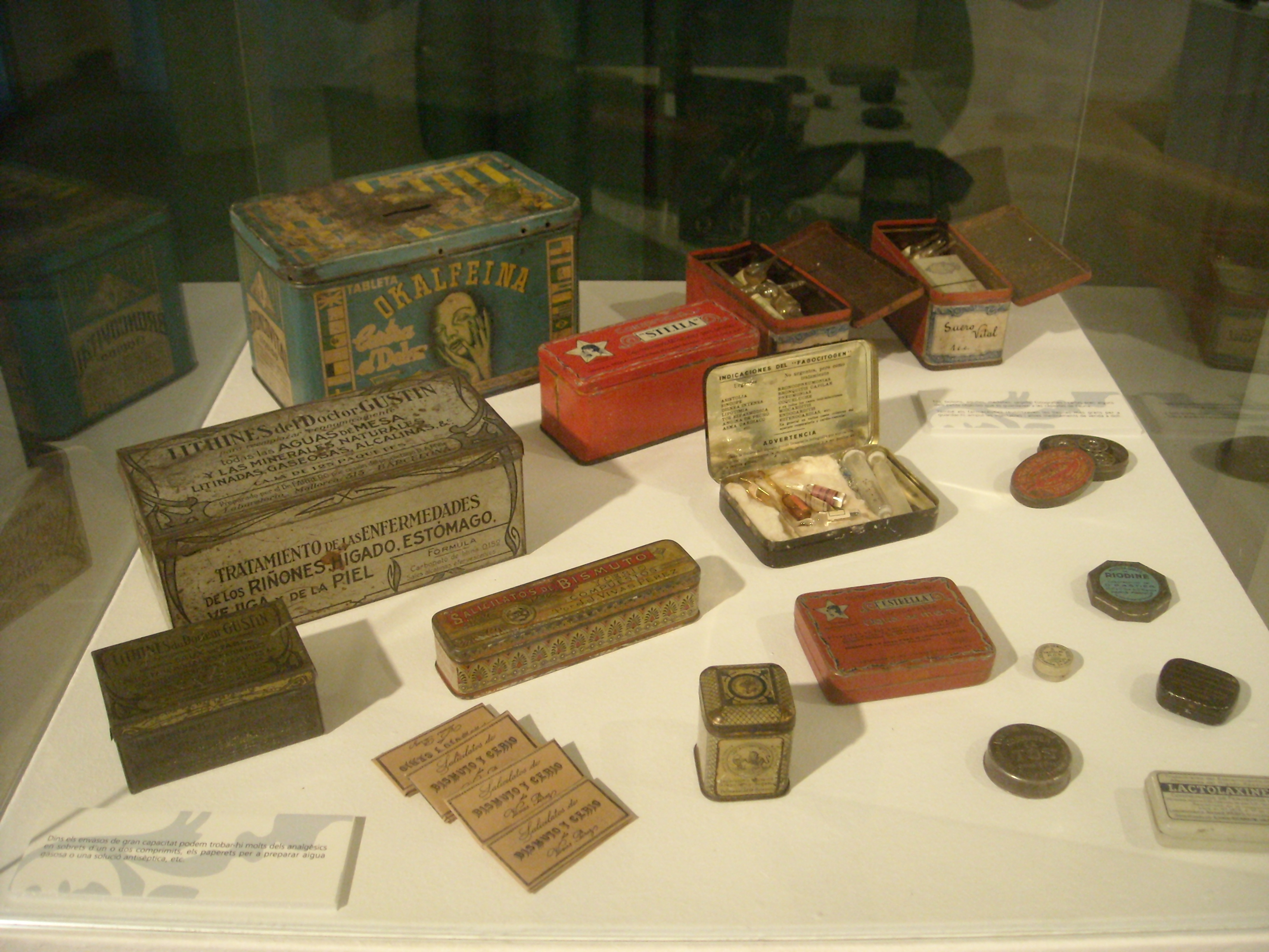 Caixes de medicaments a l'exposició de l'antiga farmàcia Balvey, a Cardedeu (Catalunya)